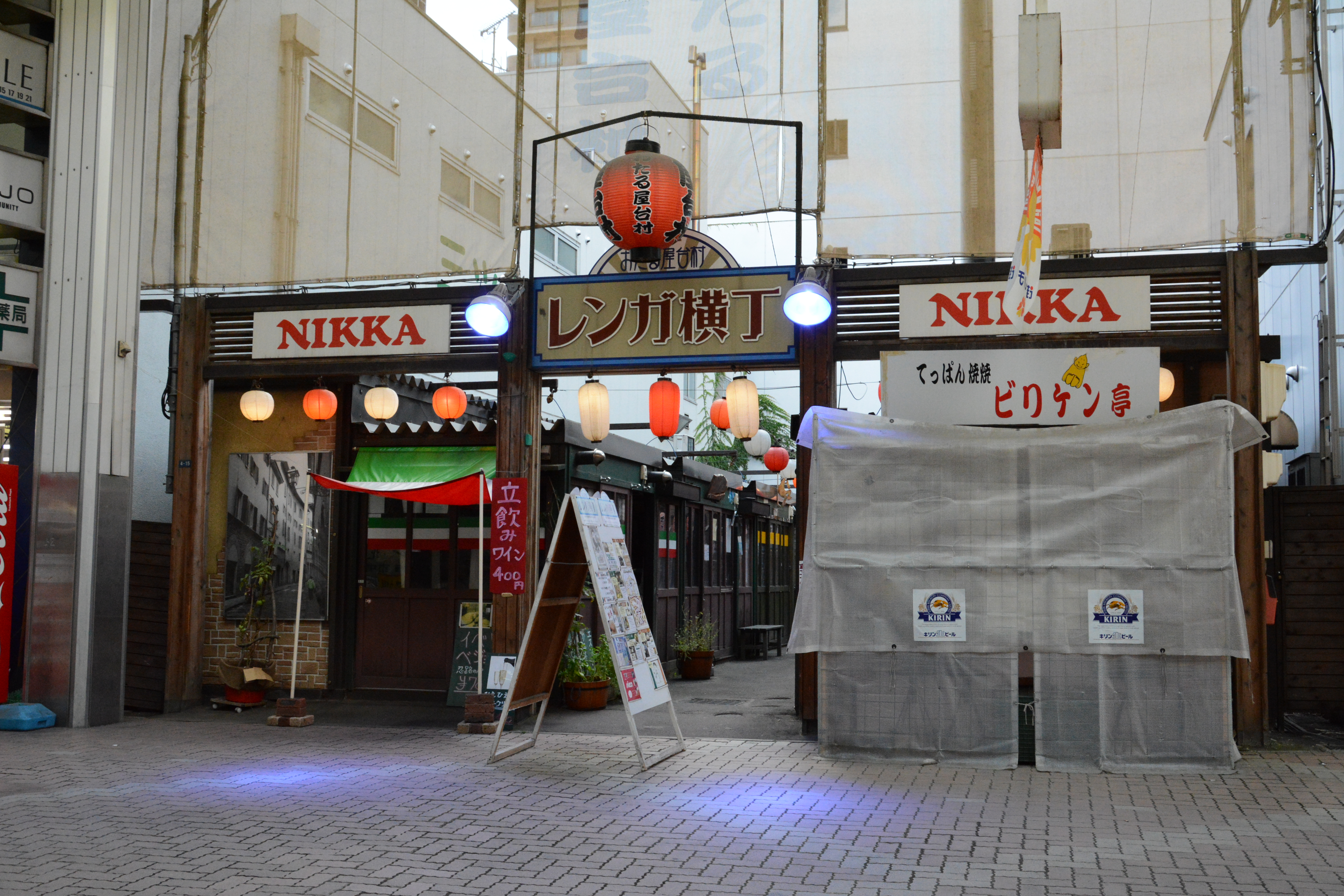 小樽サンモール一番街内のレンガ横丁